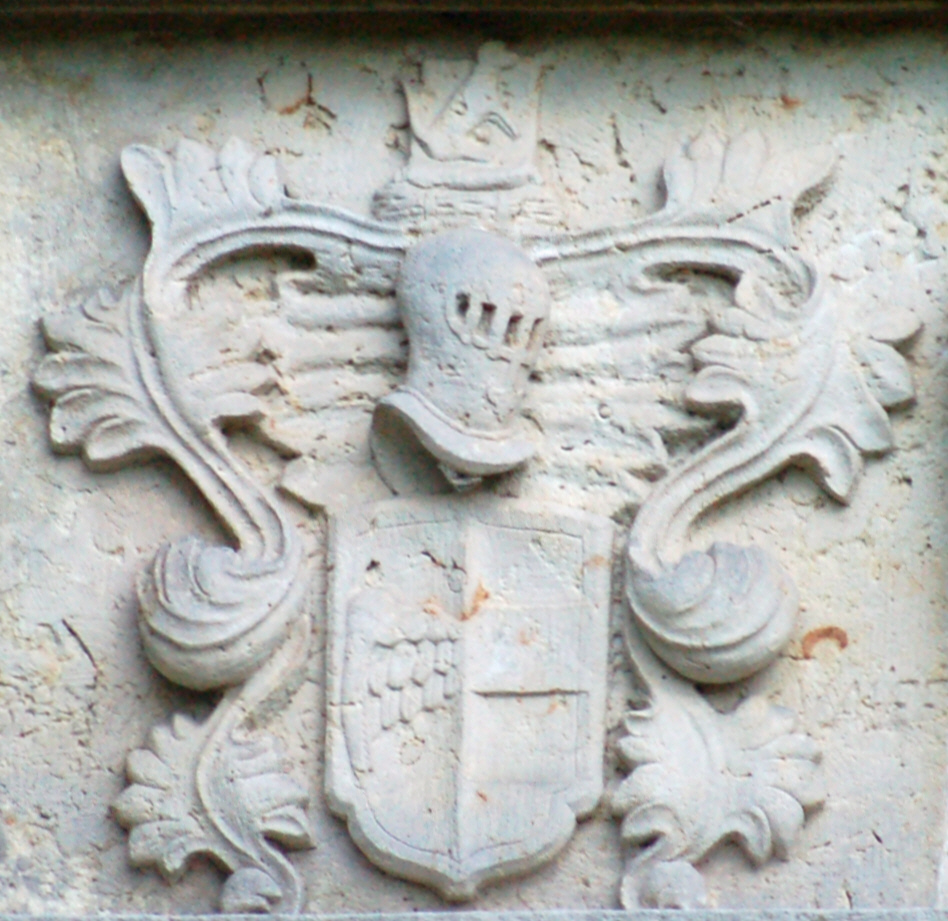 Wappen von Benedikt (Bendix) von Ahlefeldt († 1586) an der Ostwand der St.-Gabriel-Kirche in Haseldorf . Inschrift:BENDIX ALEF